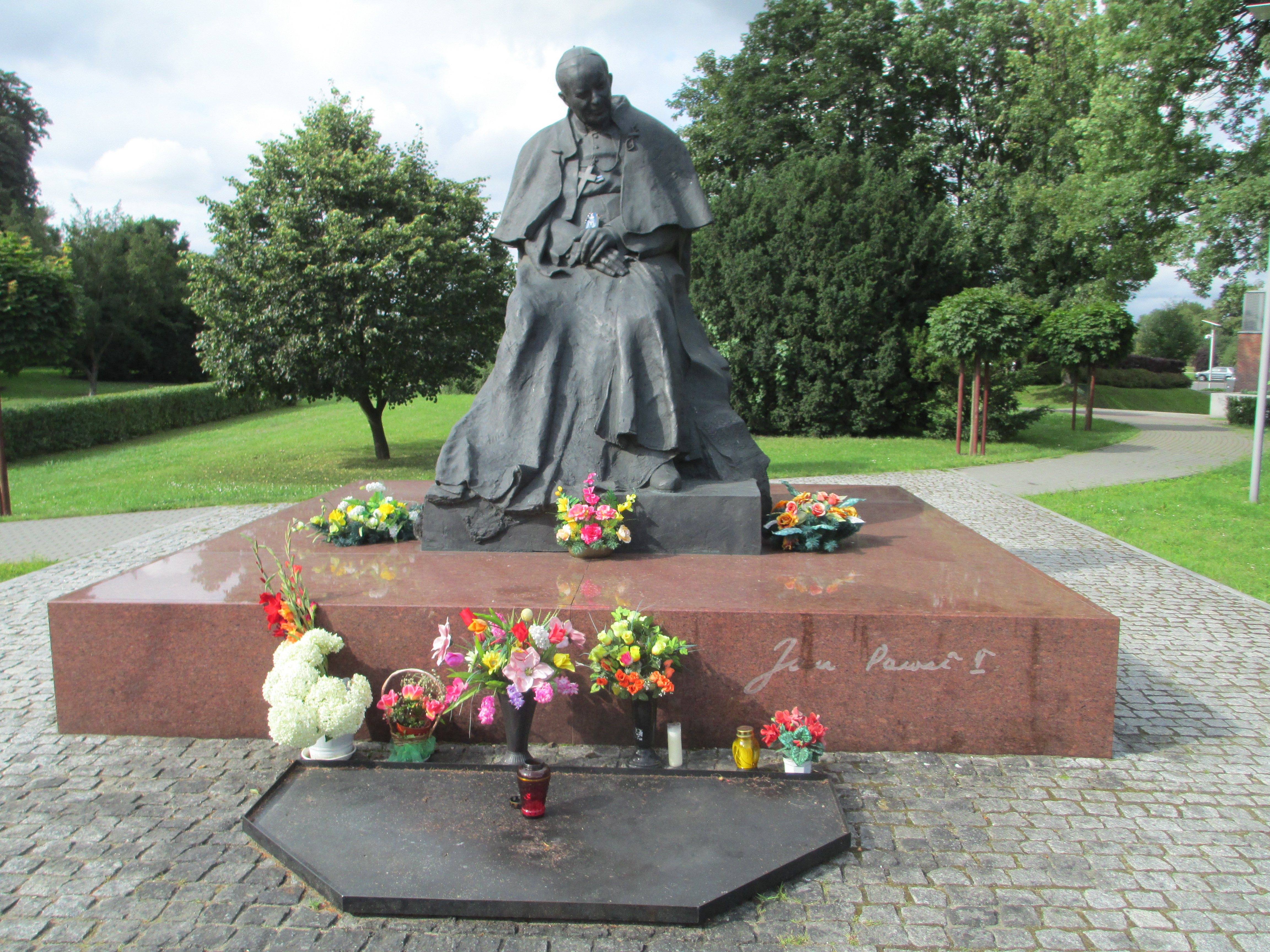 פסל של האפיפיור יוחנן פאולוס השני בטורון